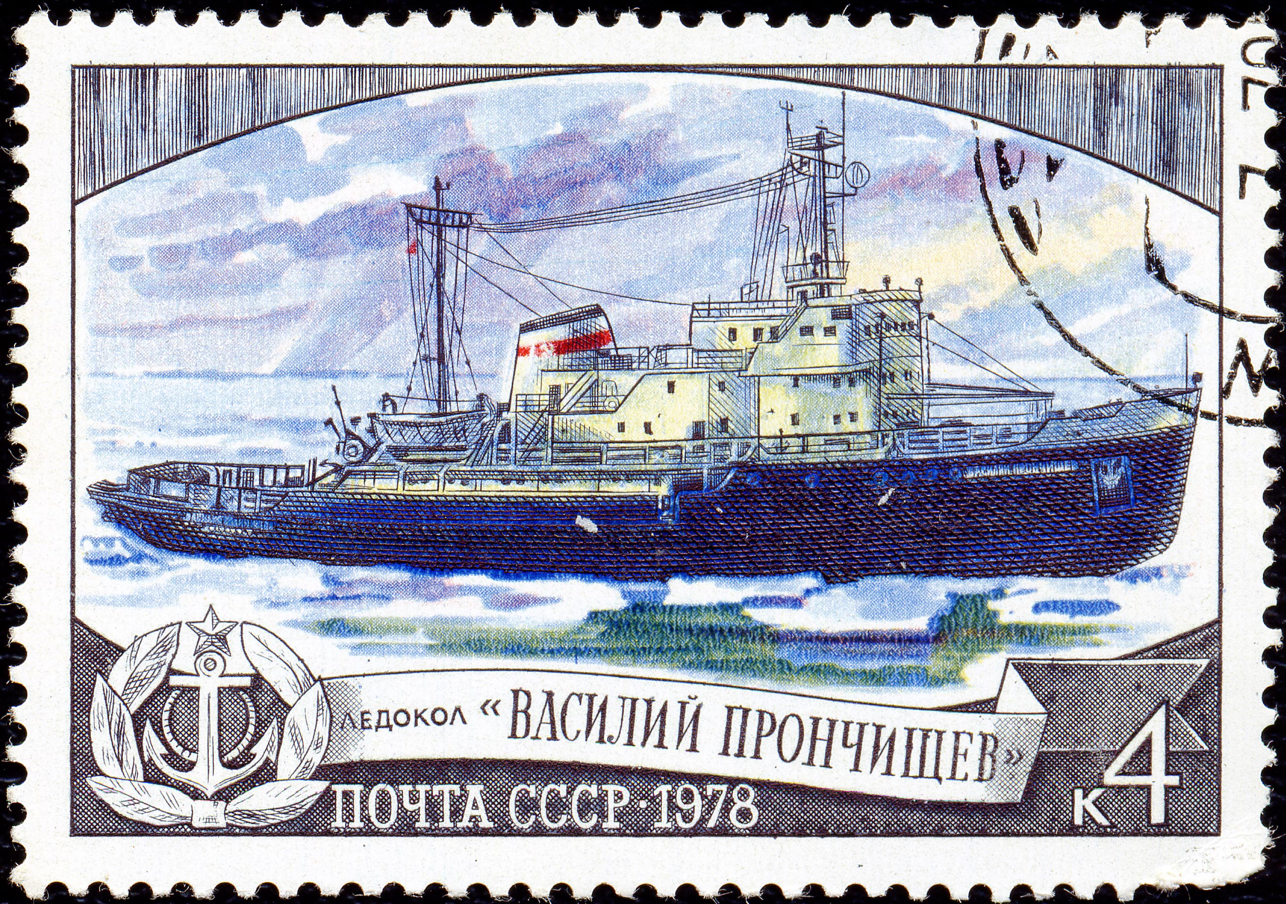 Почтовая марка СССР. 1978. Ледокол Василий Прончищев